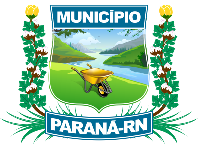 Brasão do município de Paraná, Rio Grande do Norte (Brasil)